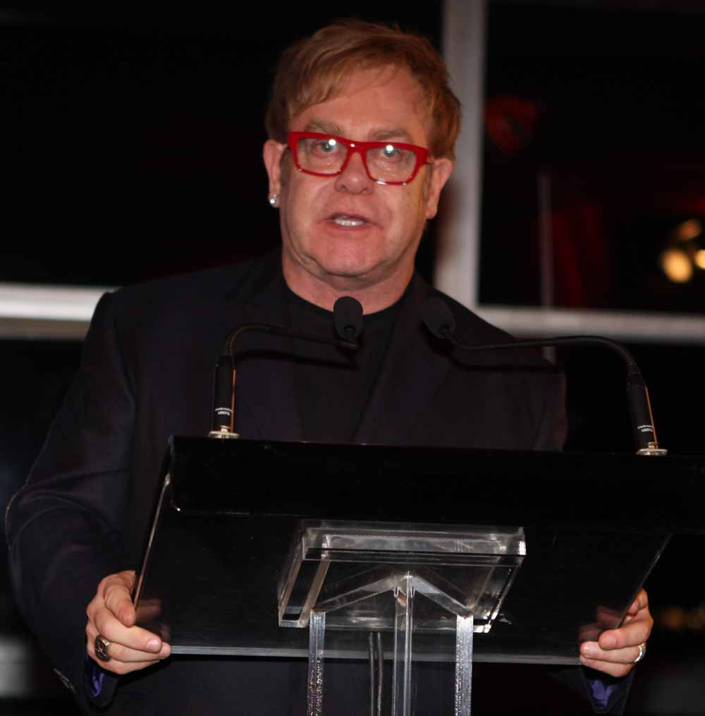 Elton John